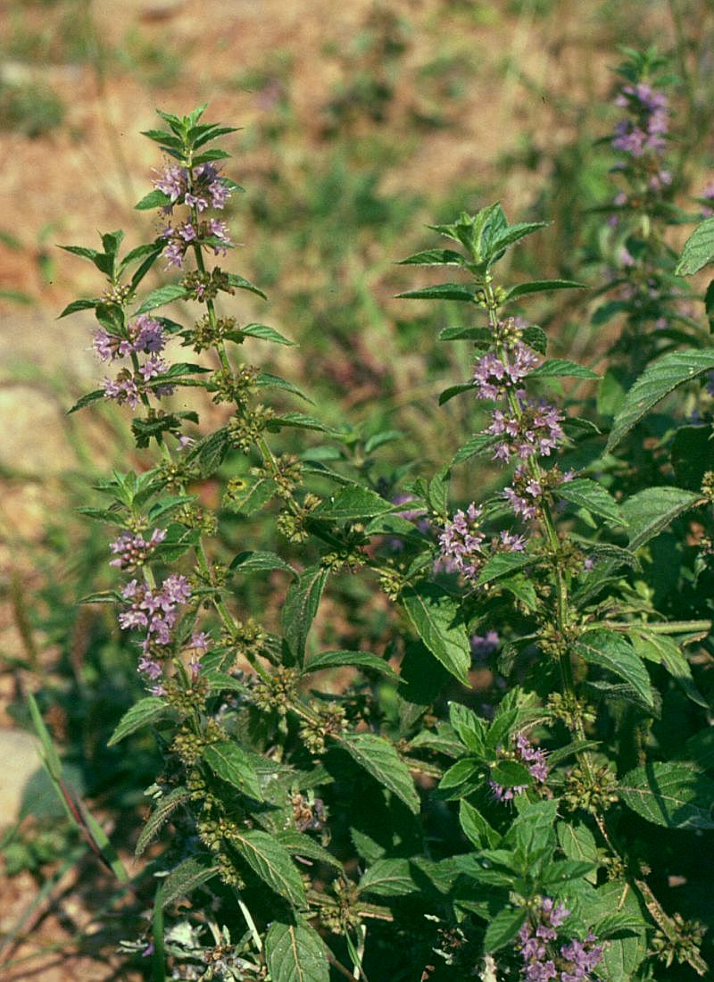 Acker-Minze (Mentha arvensis), Lippenblütler (Lamiaceae) - Slowakei/Slovensko/Slovakia: Banskobystrický kraj, Okres Brezno, bei Beňuš ENE Brezno